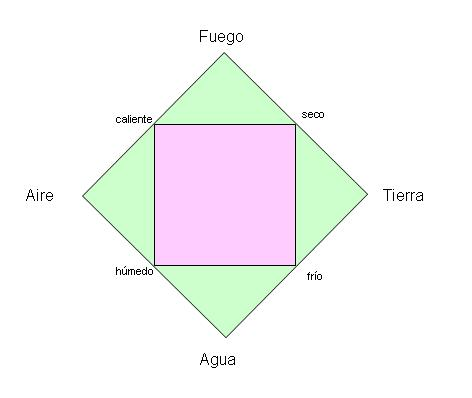 diagrama de los elementos clásicos en la Antigua Grecia